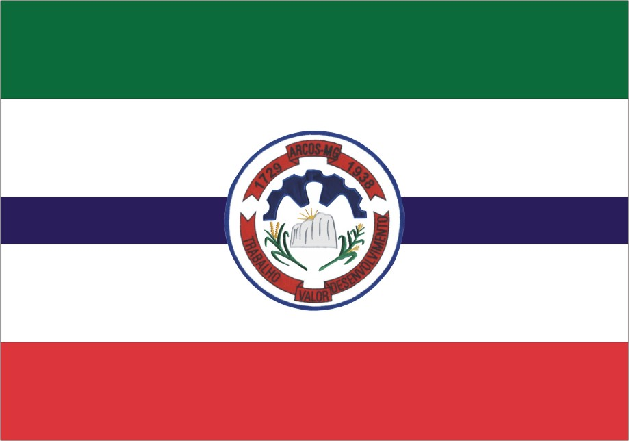 Bandeira de Arcos MG